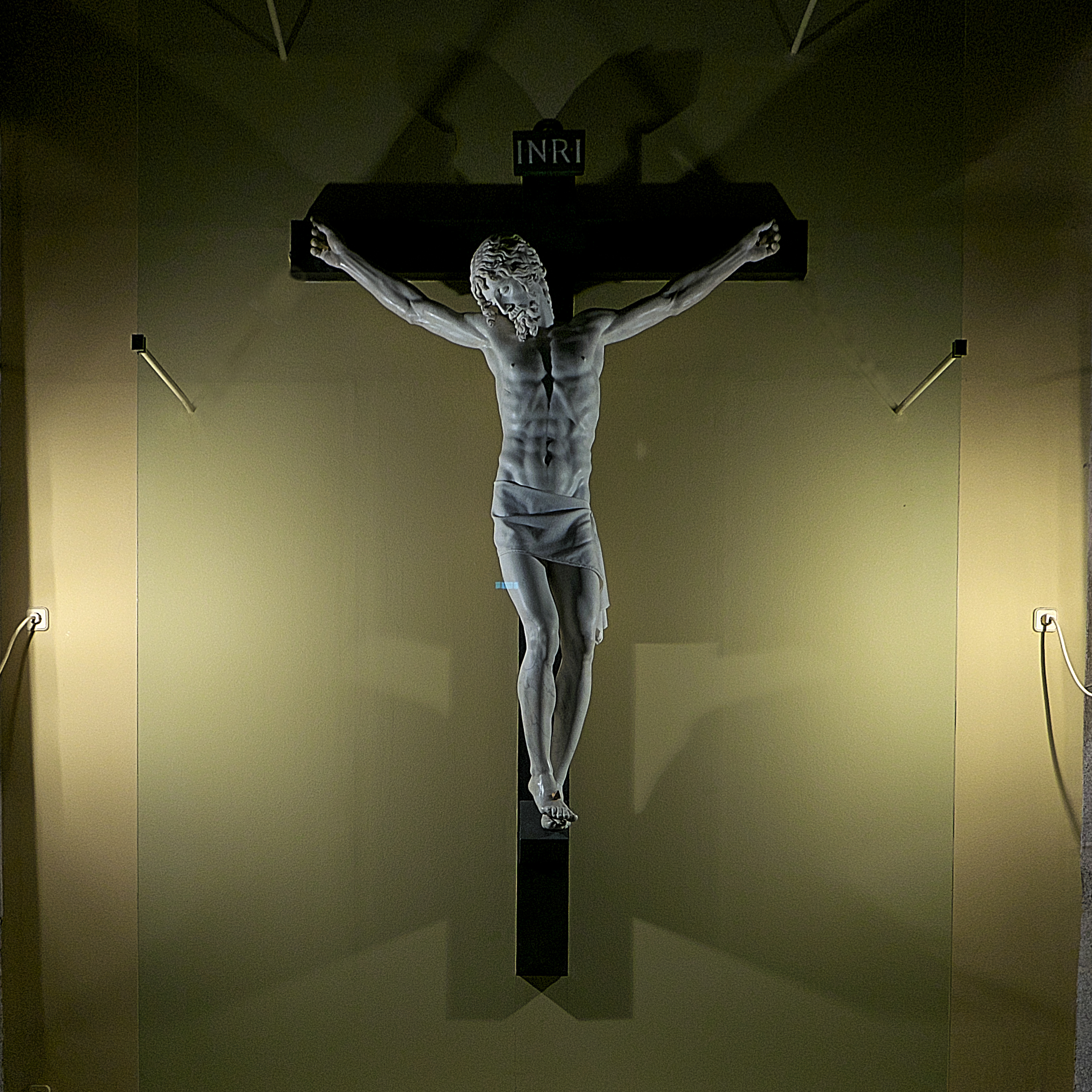 Capilla de los Dolores, Basílica del Monasterio de El Escorial. Tallado sobre mármol blanco de Carrara (1559-1562). Regalo de Francisco I de Médici a Felipe II para el monasterio jerónimo.